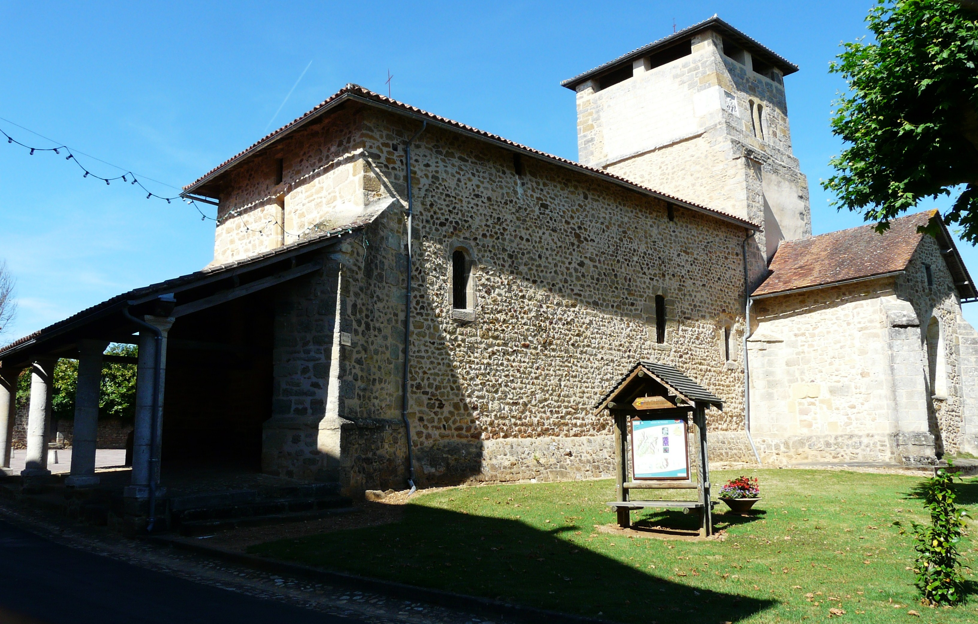 L'église Saint-Martin (vue depuis le sud-ouest), Saint-Martin-de-Fressengeas, Dordogne, France